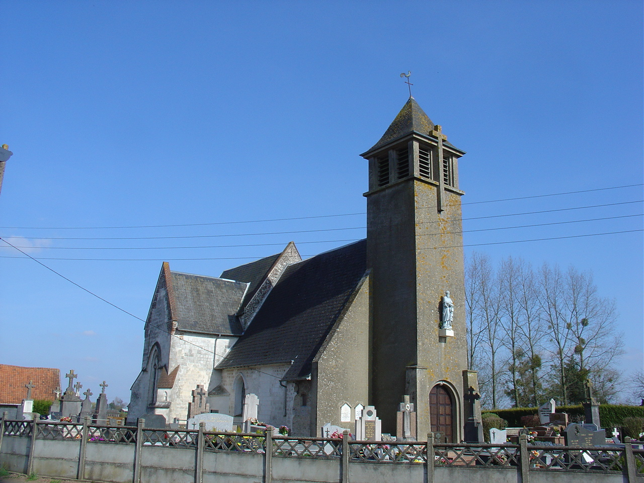 Église de Béalencourt